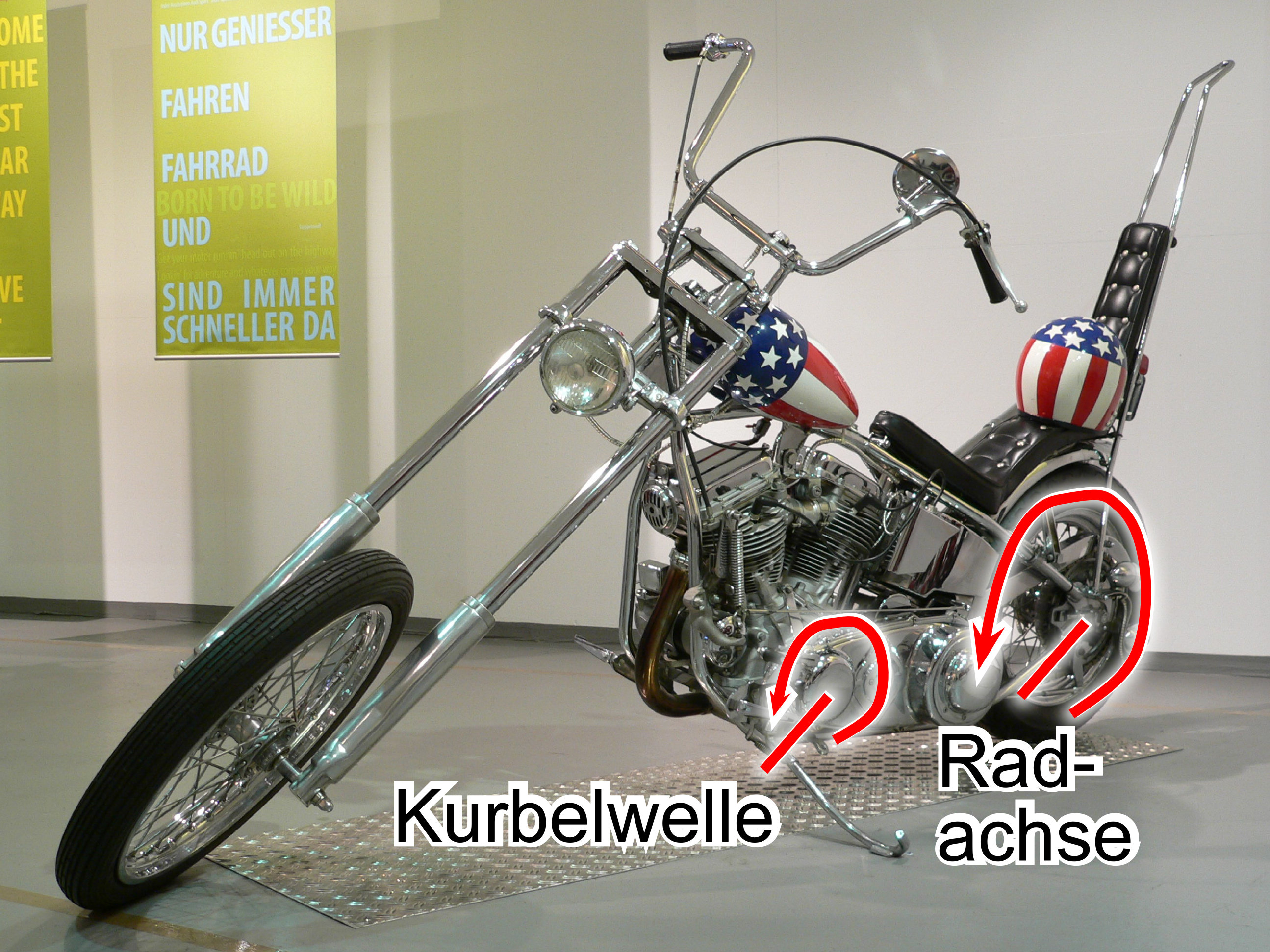 Motorbike "Easy-Rider-Chopper" Harley Davidson (1987) (Another View) at the Deutsches Zweirad- und NSU-Museum (50 PS)